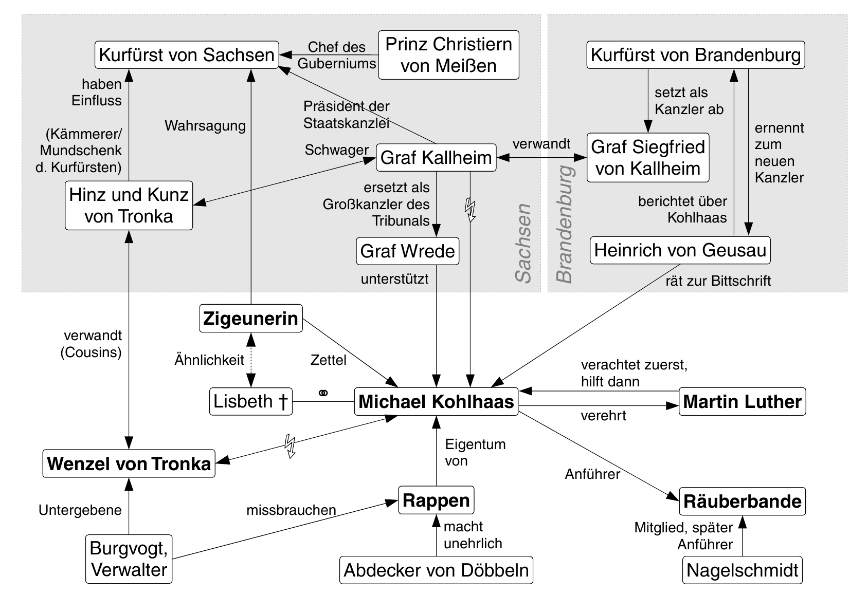 Personendiagramm für Kleists Novelle „Michael Kohlhaas“